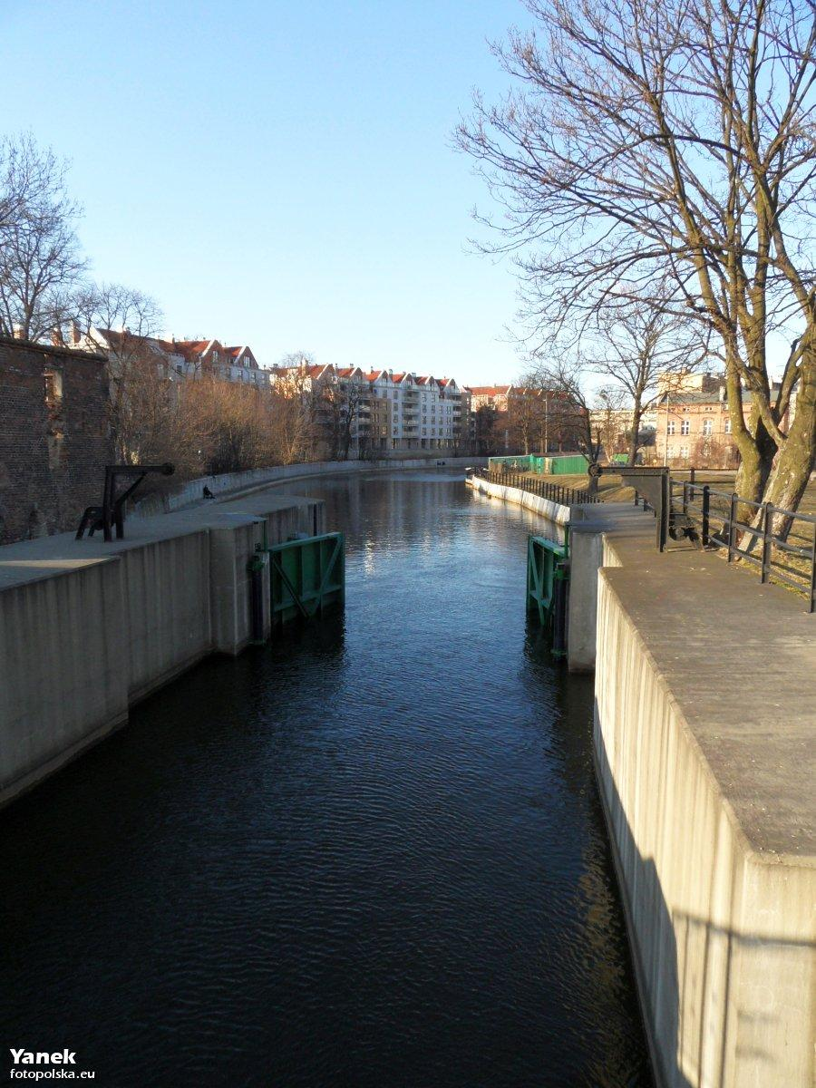 Wyjście śluzy na wody w mieście